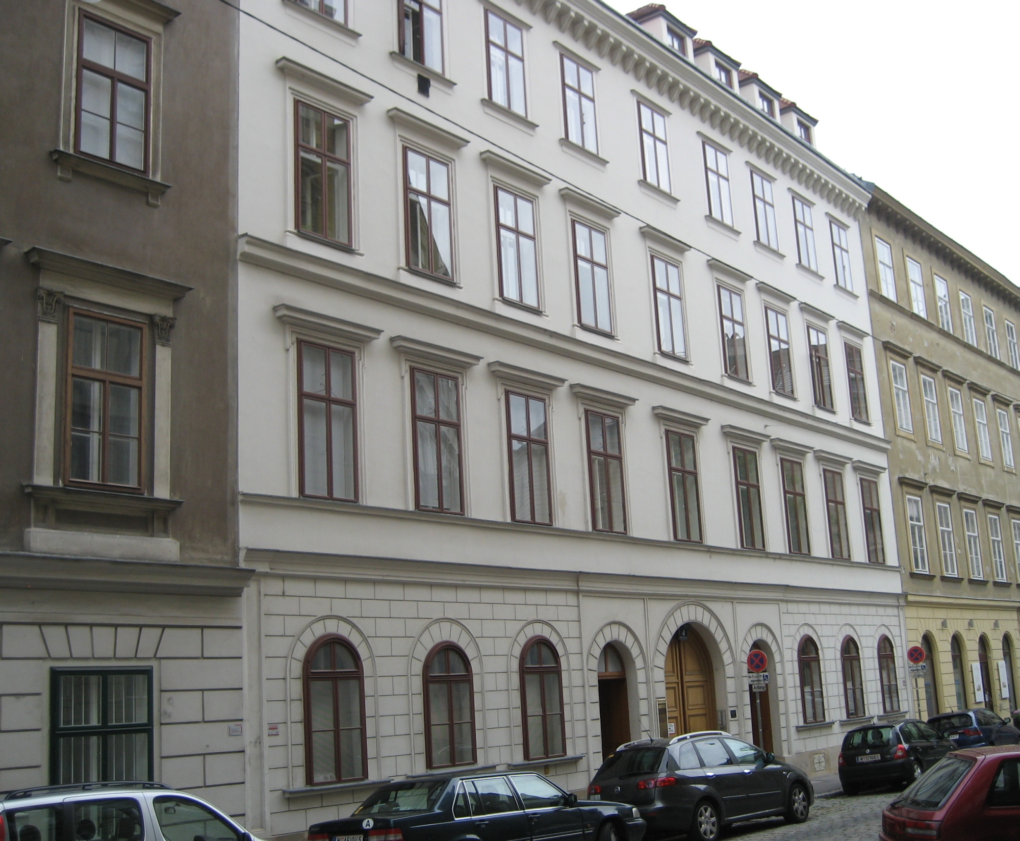 das Haus Wickenburggasse 4 in der Josefstadt, in Wien